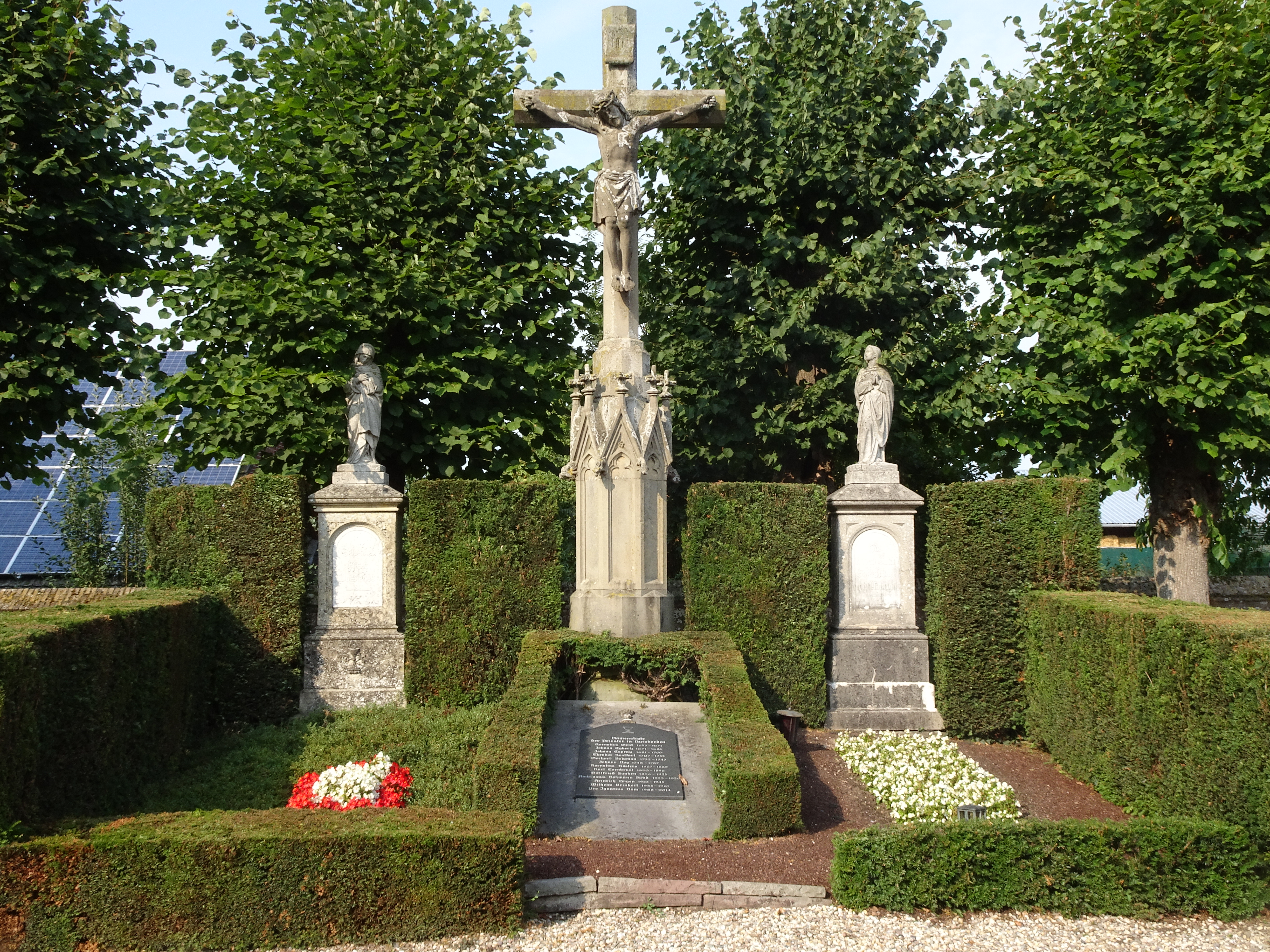 Duitsland, Bedurg-Hau - Huisberden. Kruisbeeldgroep op het kerkhof aan de St. Petruskerk